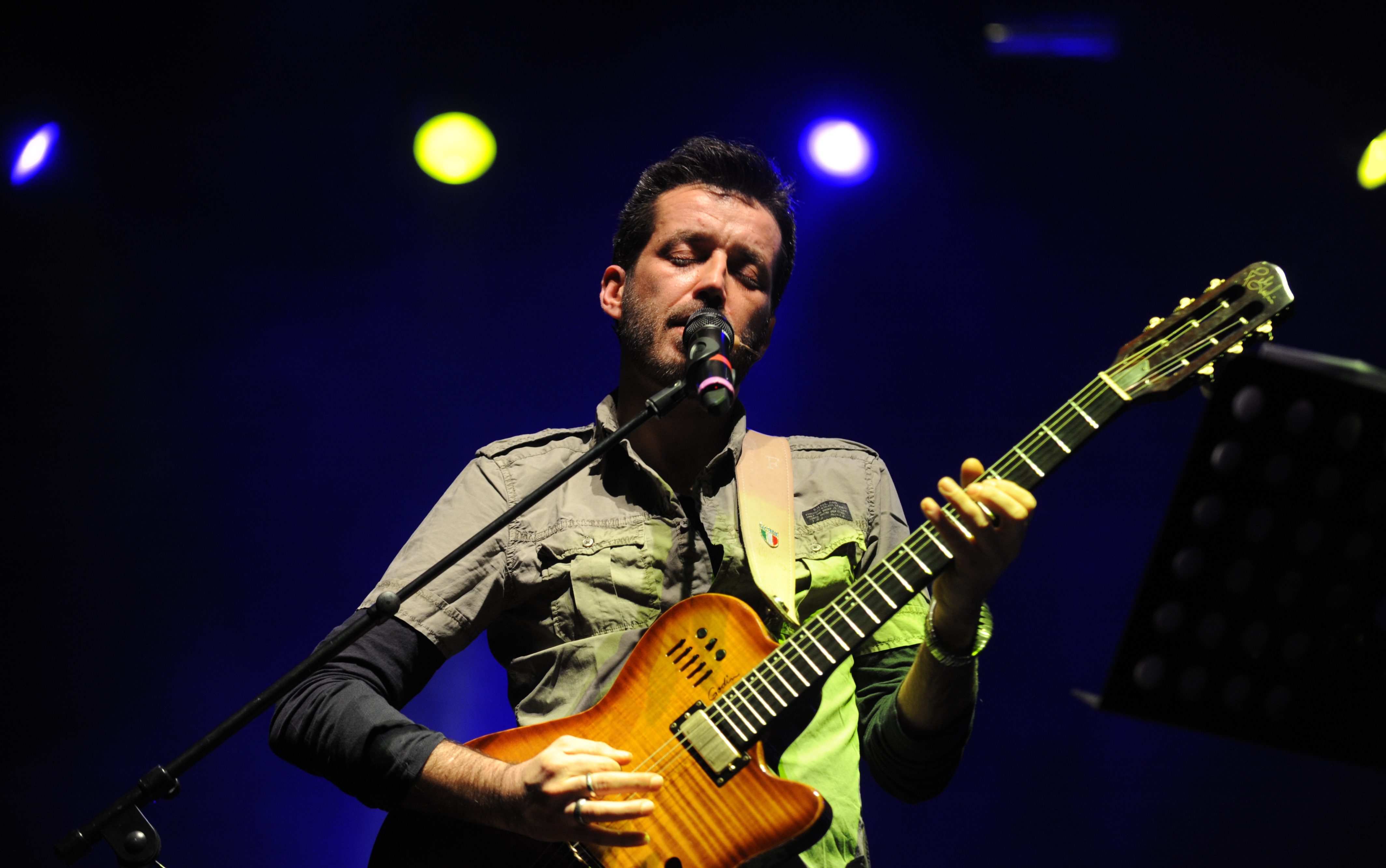 "E l’inizio arrivò in coda". Spettacolo teatrale di Daniele Silvestri e Pino Marino.